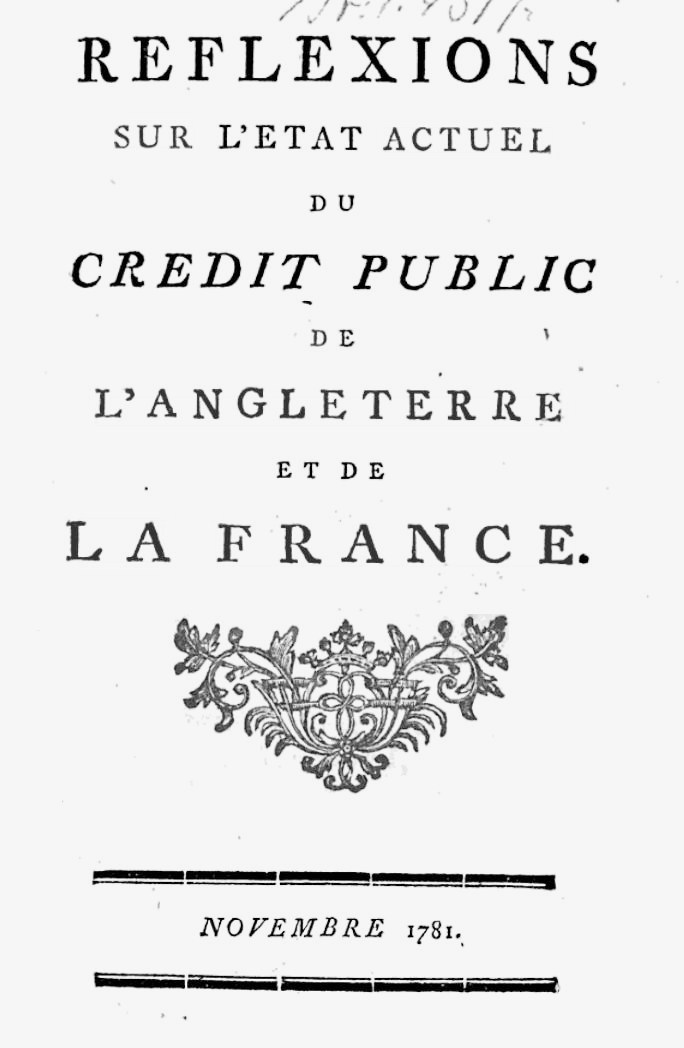 Published anonymously in november 1781 in Paris by Isaac Panchaud, British Banker.